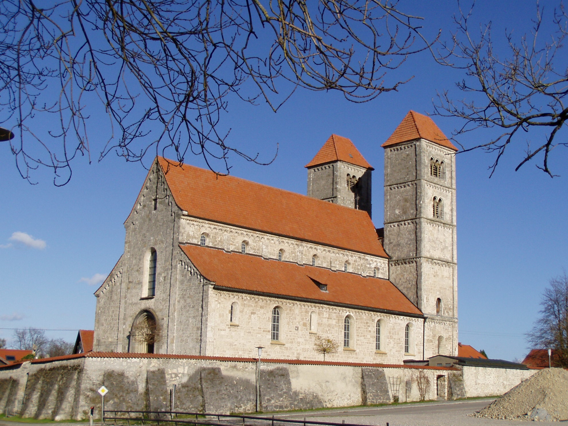 Basilika in Altenstadt